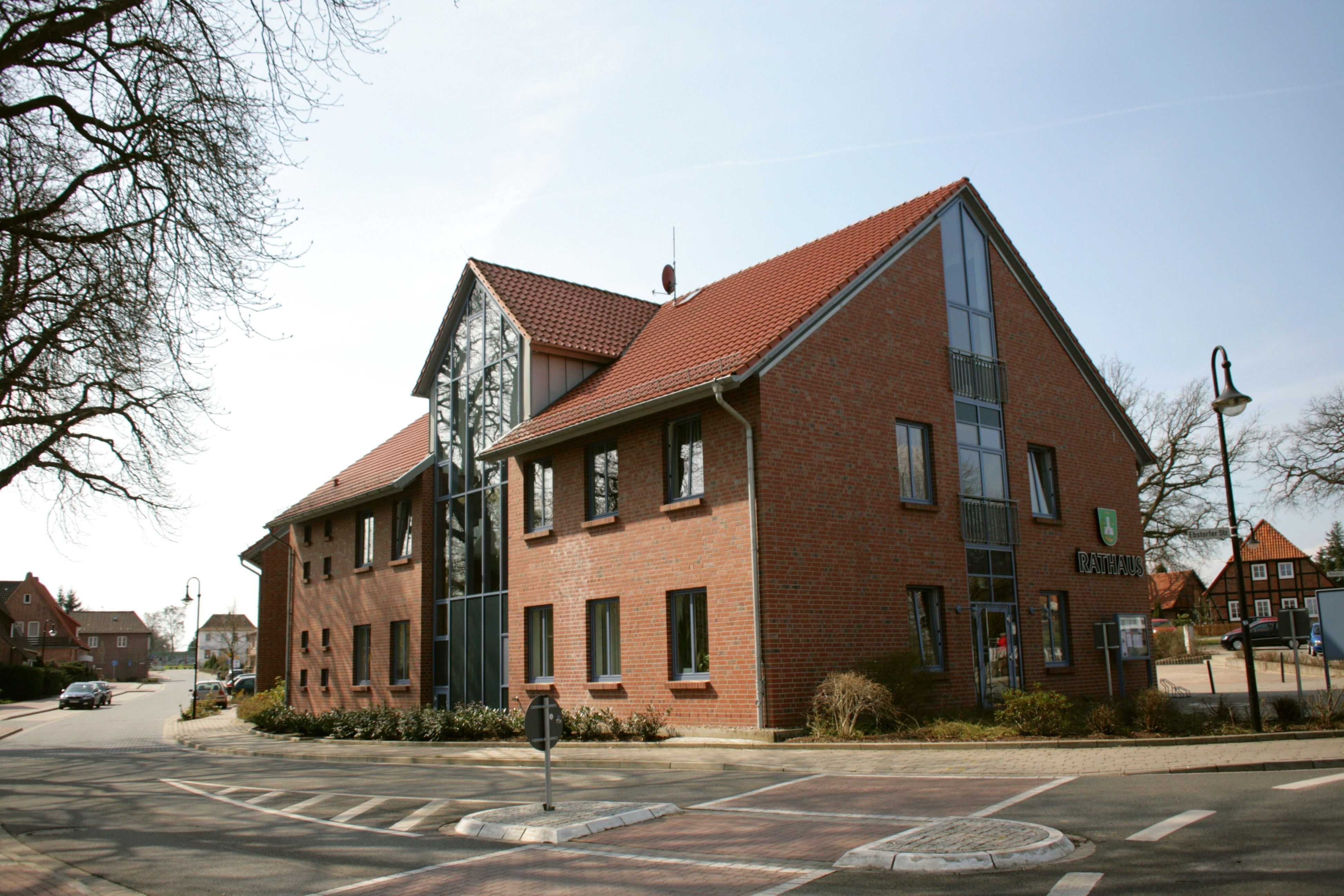 Rathaus an der Ebstorfer Straße in Bienenbüttel